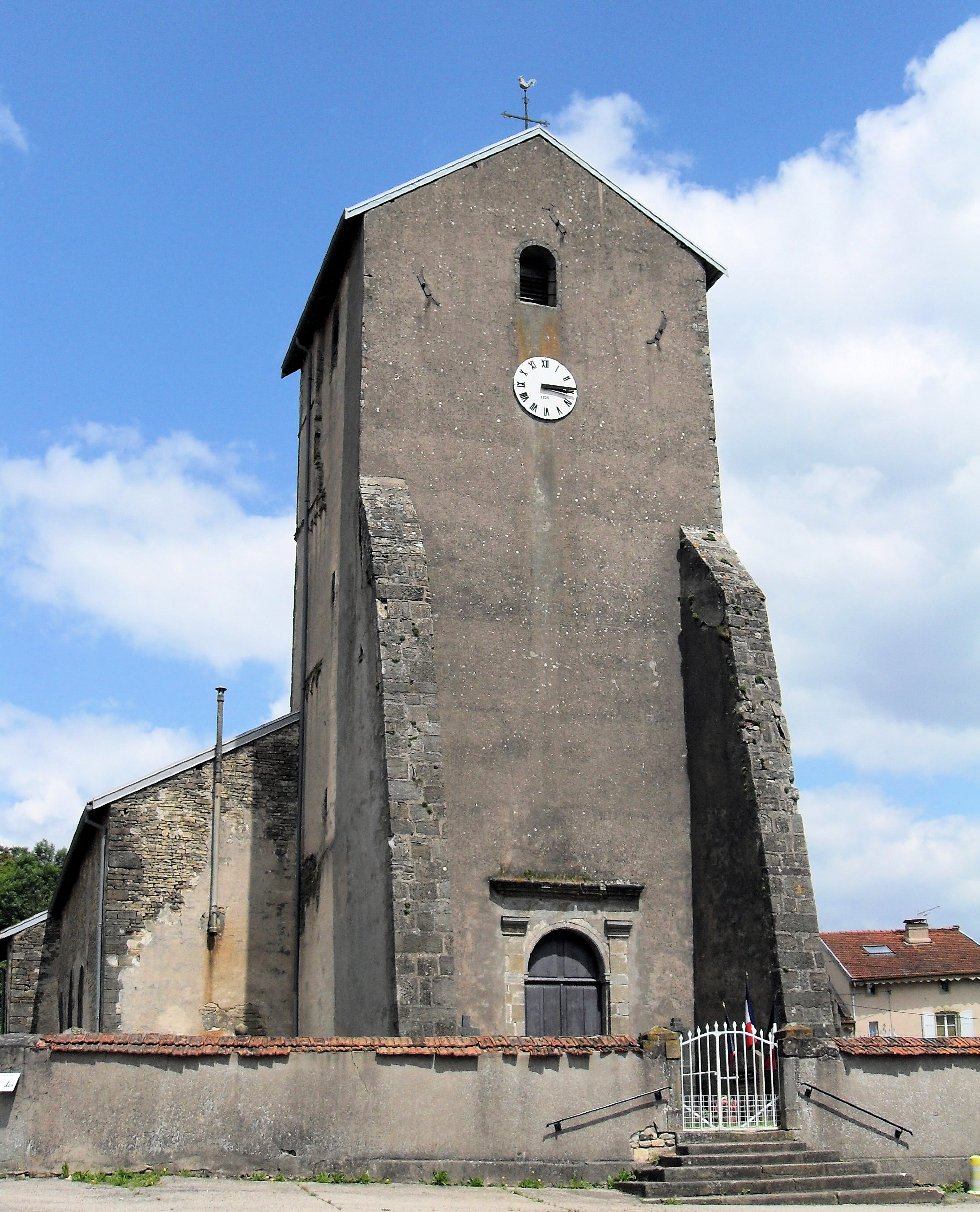 L'église Saint-Georges à Bouzemont